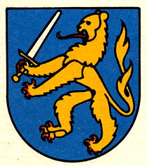 Wappe von Ayent VS